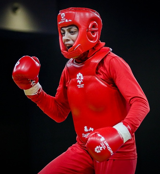 شهربانو منصوریان در رقابت‌های ووشو، بازی‌های آسیایی ۲۰۱۸